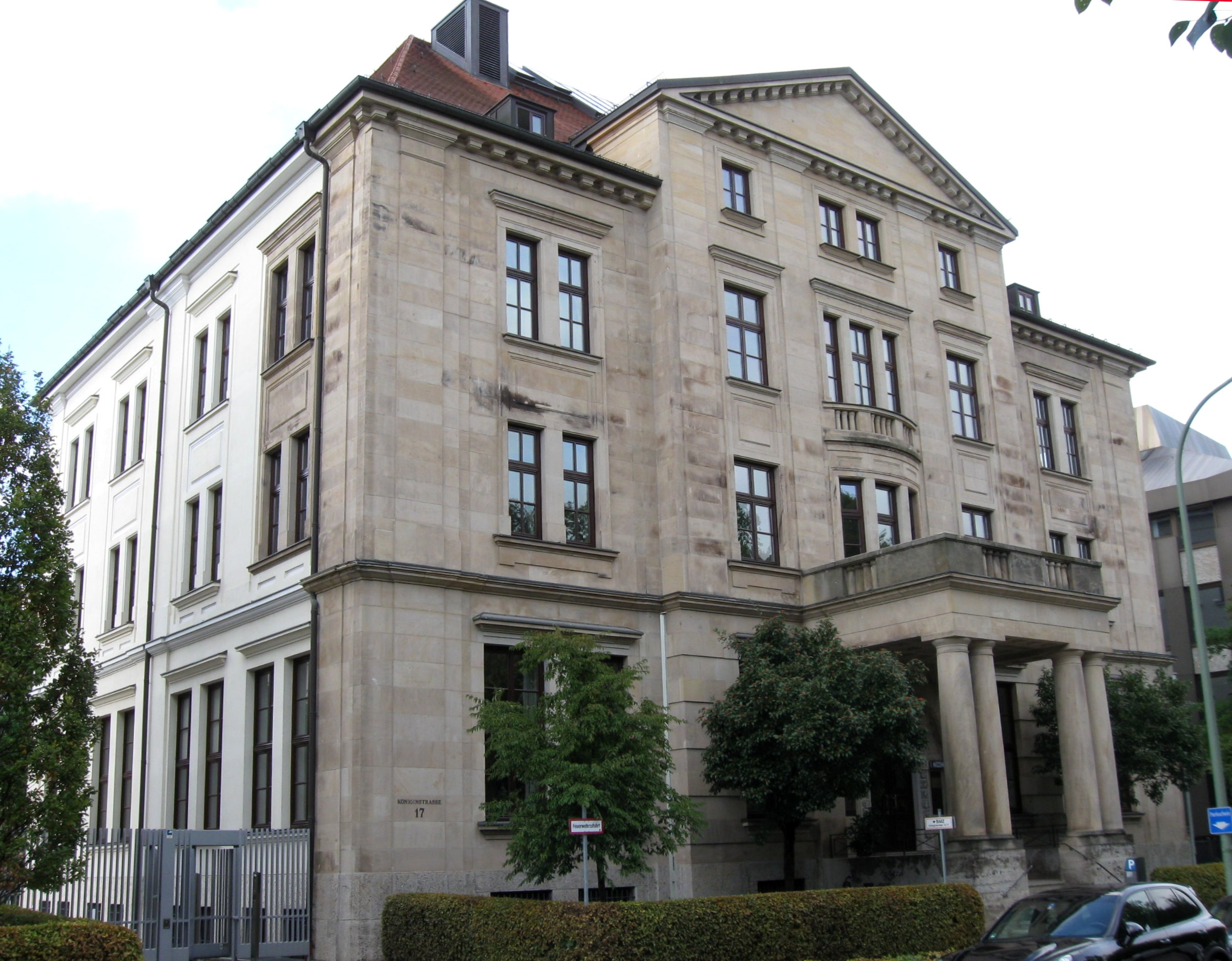 Königinstraße 17, ehem. herrschaftliche Villa, jetzt LfA Förderbank BayernBayer. Landesanstalt für Aufbaufinanzierung (LfA), stattlicher, palaisartiger Bau mit Natursteinfassade und großem Säulenbalkon, neuklassizistisch, 1907–09 von Franz Deininger.